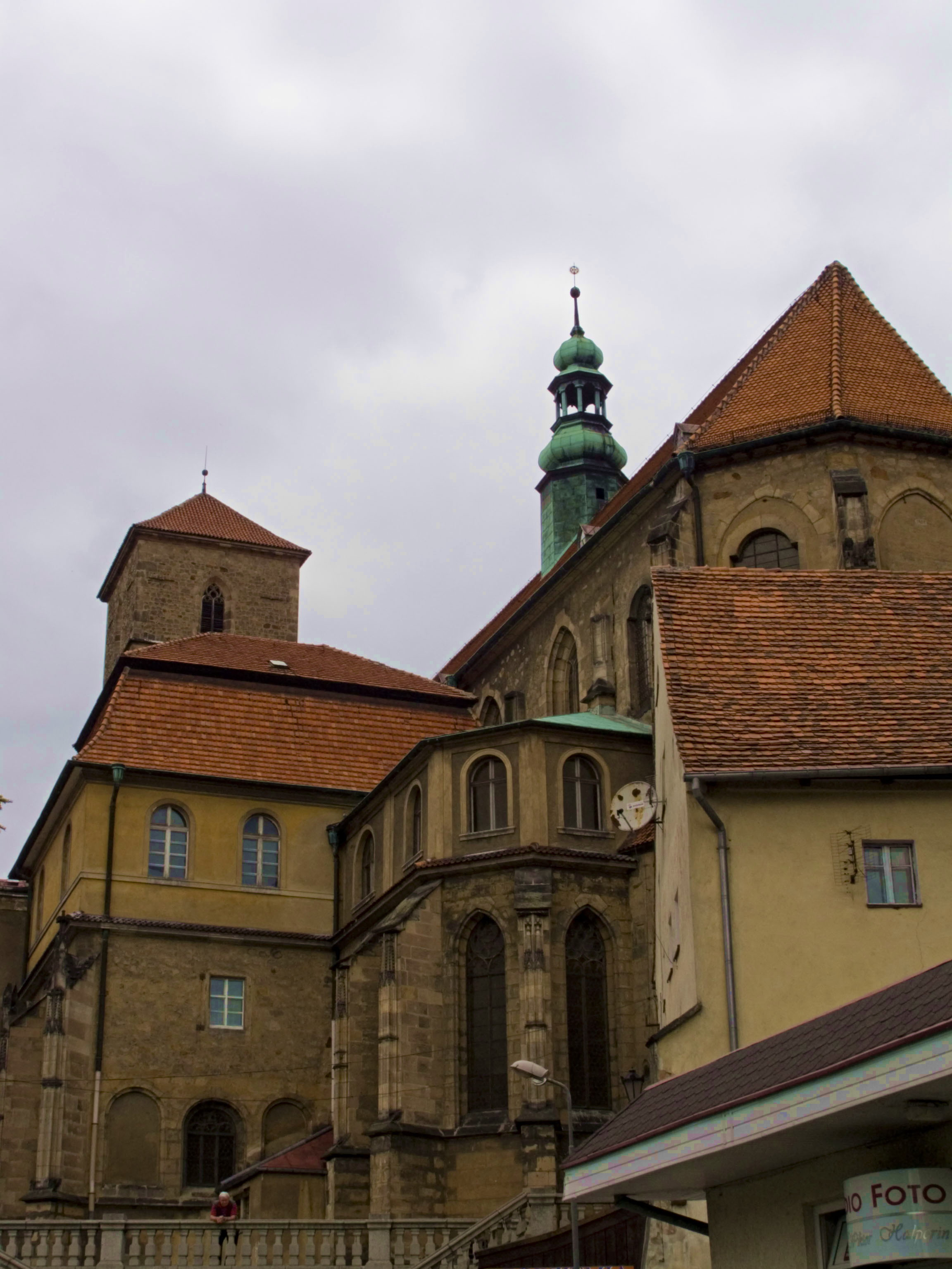 Kłodzko, Kościół Wniebowzięcia Najświętszej Marii Panny